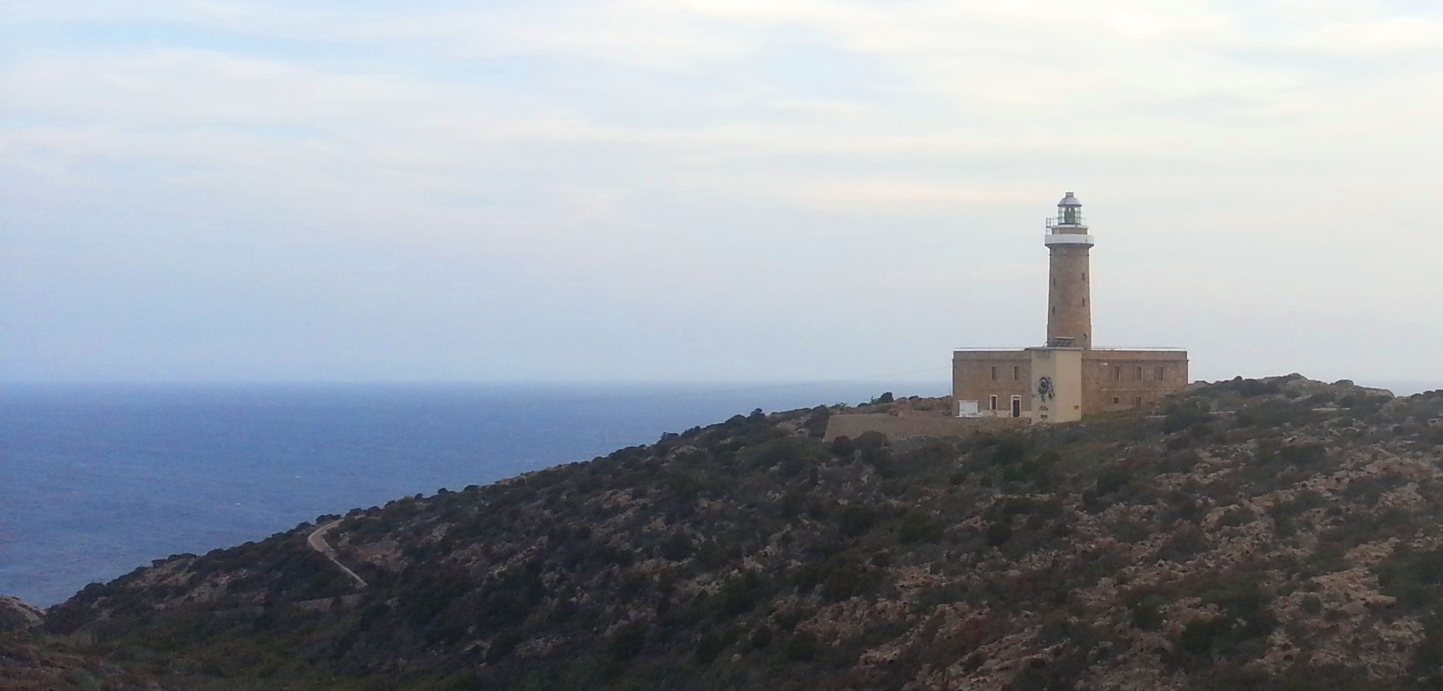 Faro de Cabo Sandálo